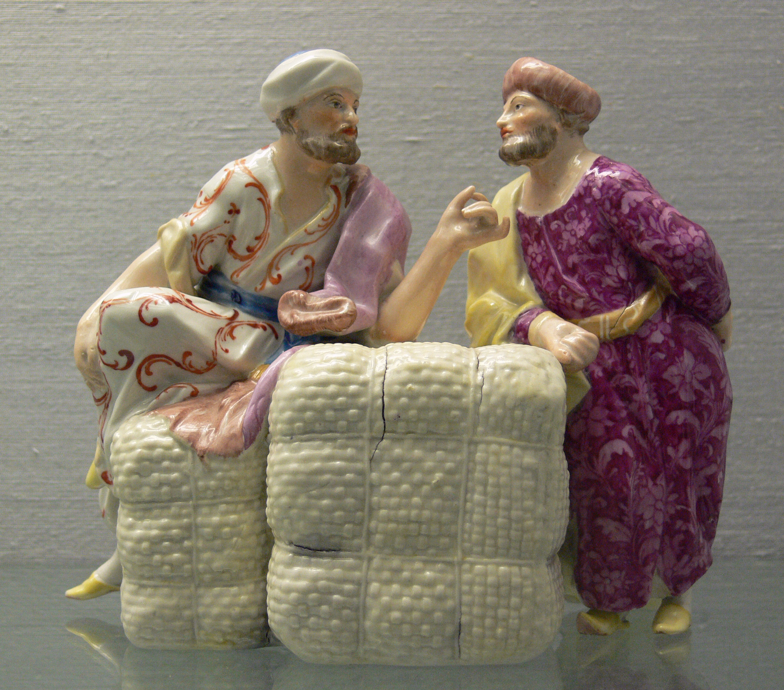 Türkische Kaufleute („Asien“) aus einem Tafelaufsatz, Porzellan, Kloster Veilsdorf, um 1776 Kunstgewerbemuseum Berlin, Inv. Nr. 87,560